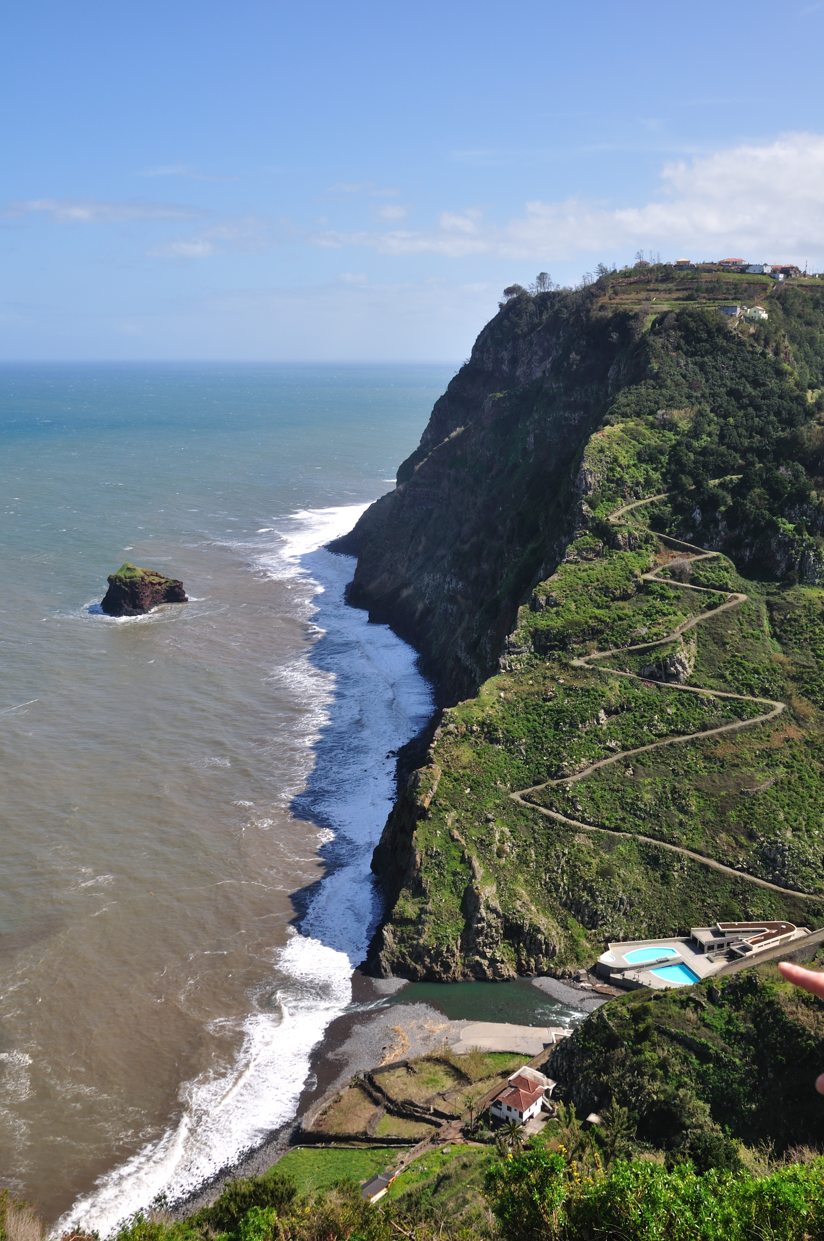 Portugal, Madeira, views in São Jorge